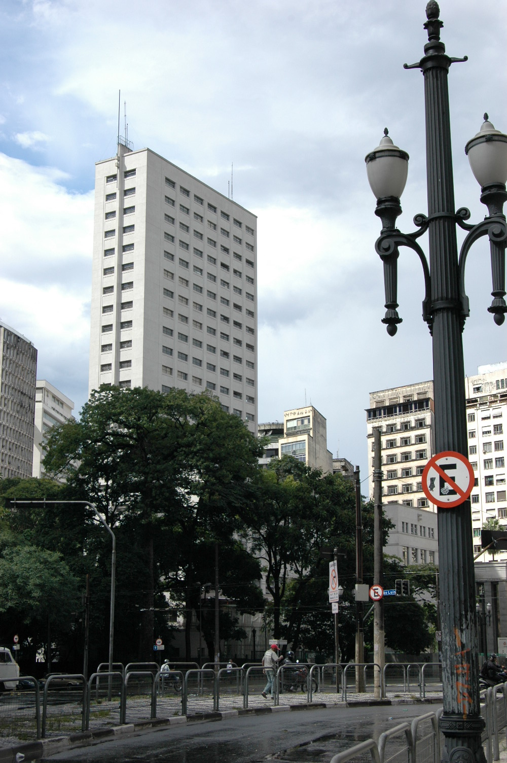 Biblioteca Mario de Andrade